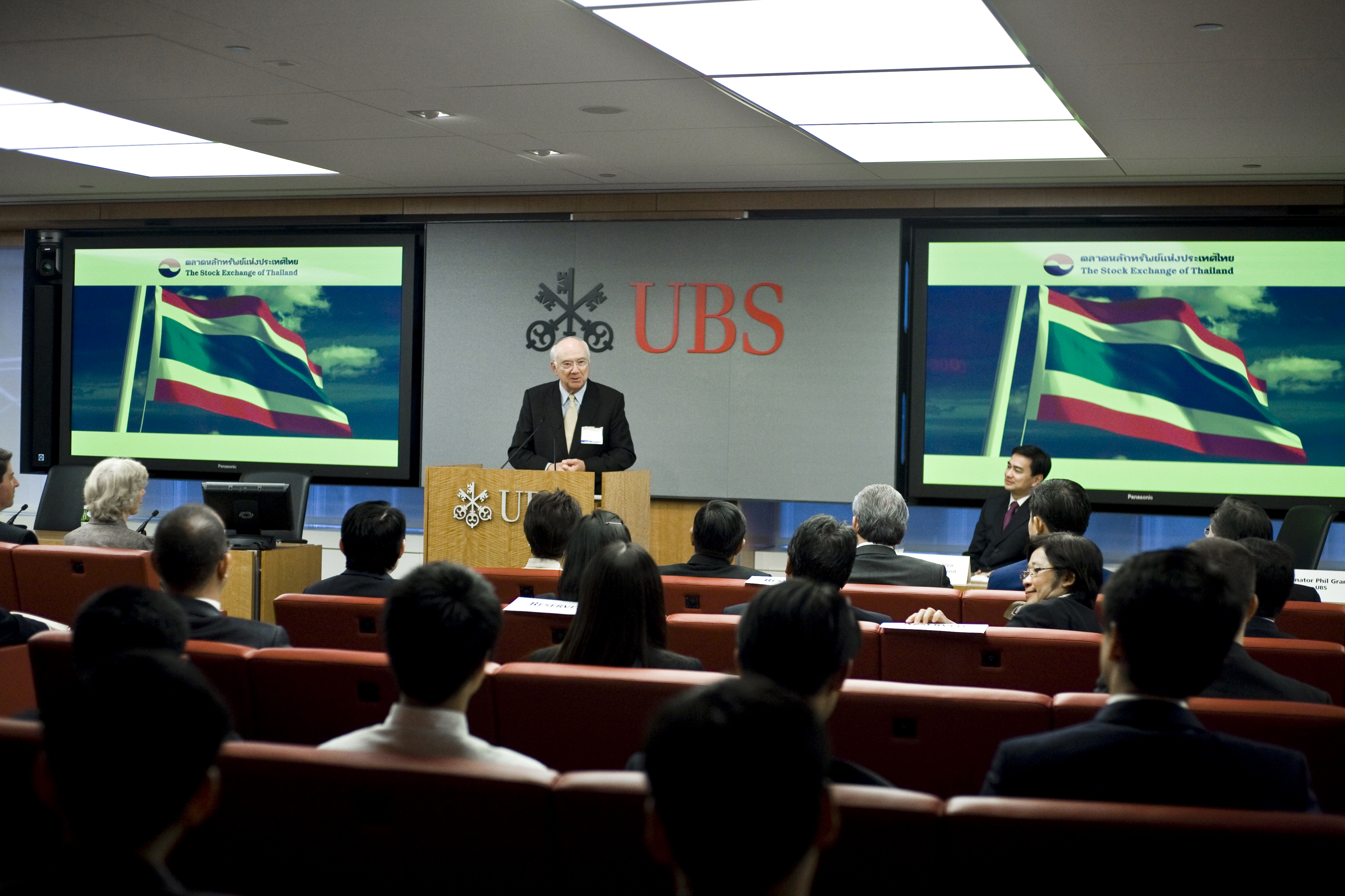 นายกรัฐมนตรี หารือกับผู้จัดการกองทุน (Fund Managers) (จัดโดยตลาดหลักทัพย์แห่งประเทศไทย) ณ ห้อง Auditorium ชั้น9 อาคาร UBS นายกรัฐมนตรี เข้าร่วมการประชุมสมัชชาสหประชาชาติ สมัยสามัญ ครั้งที่ 64 และการประชุม Pittsburgh Summit ณ นครนิวยอร์ก สหรัฐอเมริกา วันที่ 21กันยายน 2552 (The Official Site of The Prime Minister of Thailand Photo by พีรพัฒน์ วิมลรังครัตน์)